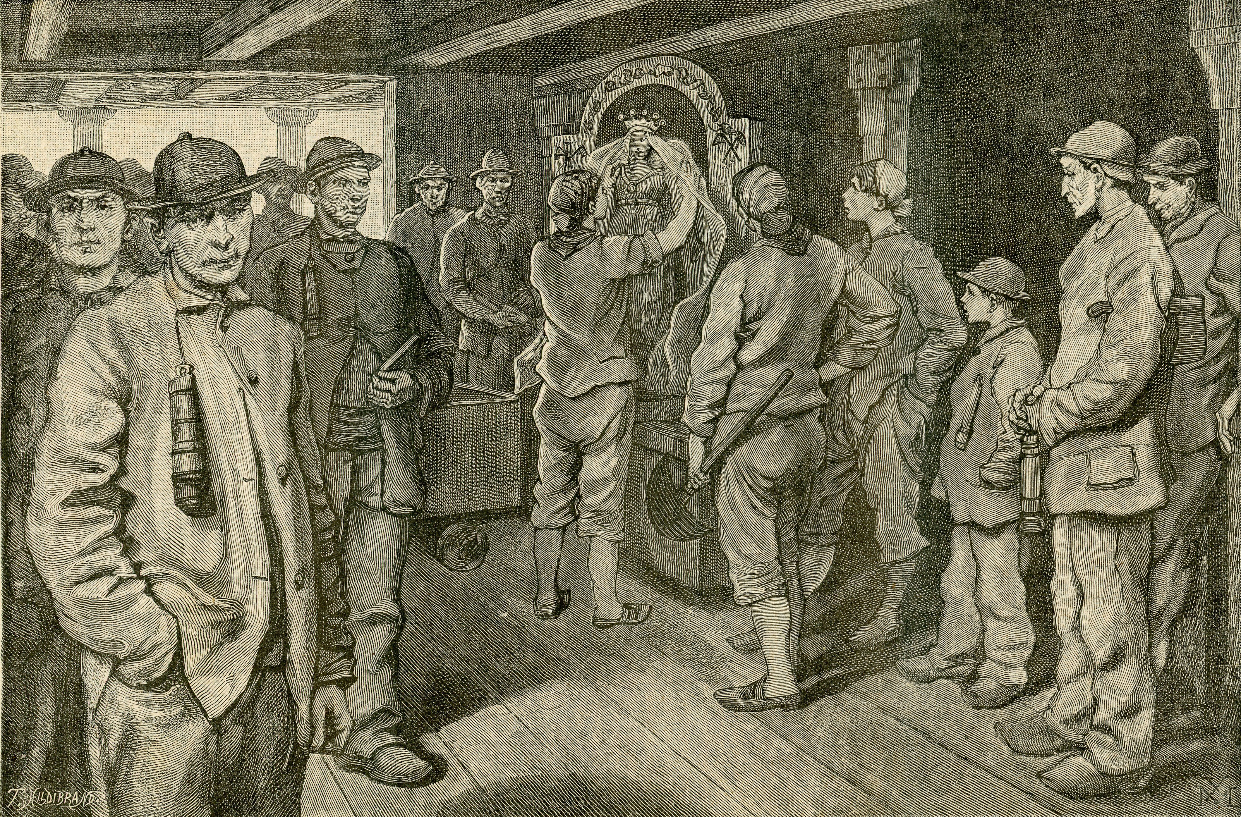 La vita dei minatori nel Belgio. – Operaie del carbon fossile che adornano la statua di Santa Barbara (xilografia).